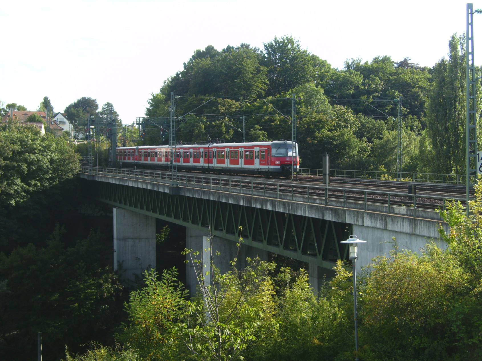 Triebwagen der S-Bahn Stuttgart überquert das Nesenbachviadukt in Stuttgart-Vaihingen